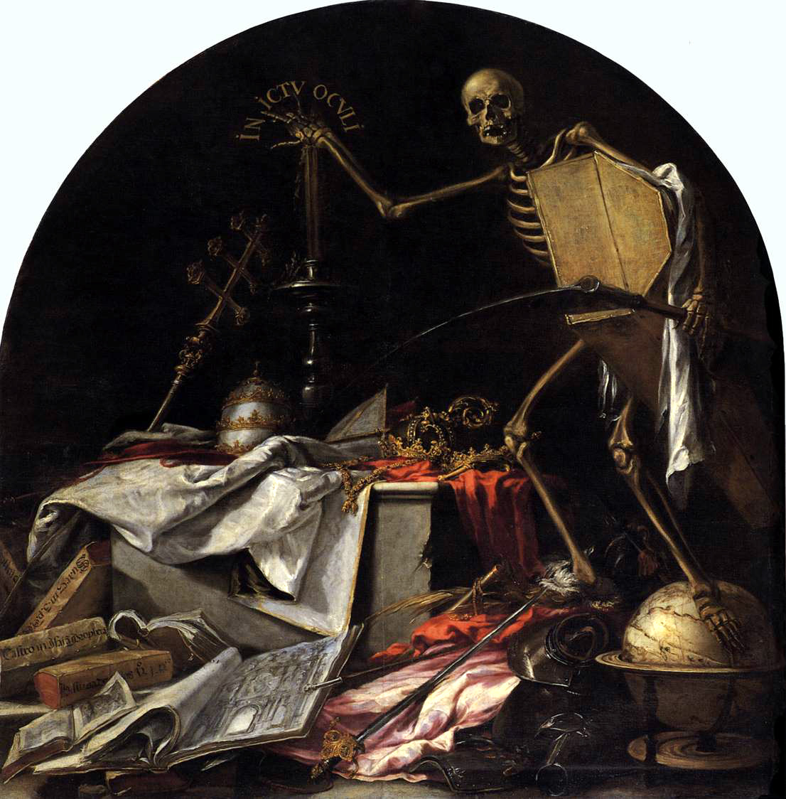 Esta obra, junto con la que lleva por título Finis Gloriae Mundi, le fue encargada a Juan de Valdés Leal para ser colocada en el sotocoro del Hospital de la Caridad de Sevilla, y al igual que en las pinturas del género Vanitas, aluden a la banalidad de la vida terrena y a la universalidad de la muerte, aunque también quedan unidas con el fin primordial de la Hermandad de la Caridad de Sevilla, que era el de enterrar a los ajusticiados e indigentes de la ciudad, al igual que otras hermandades similares existentes en España en esa época.